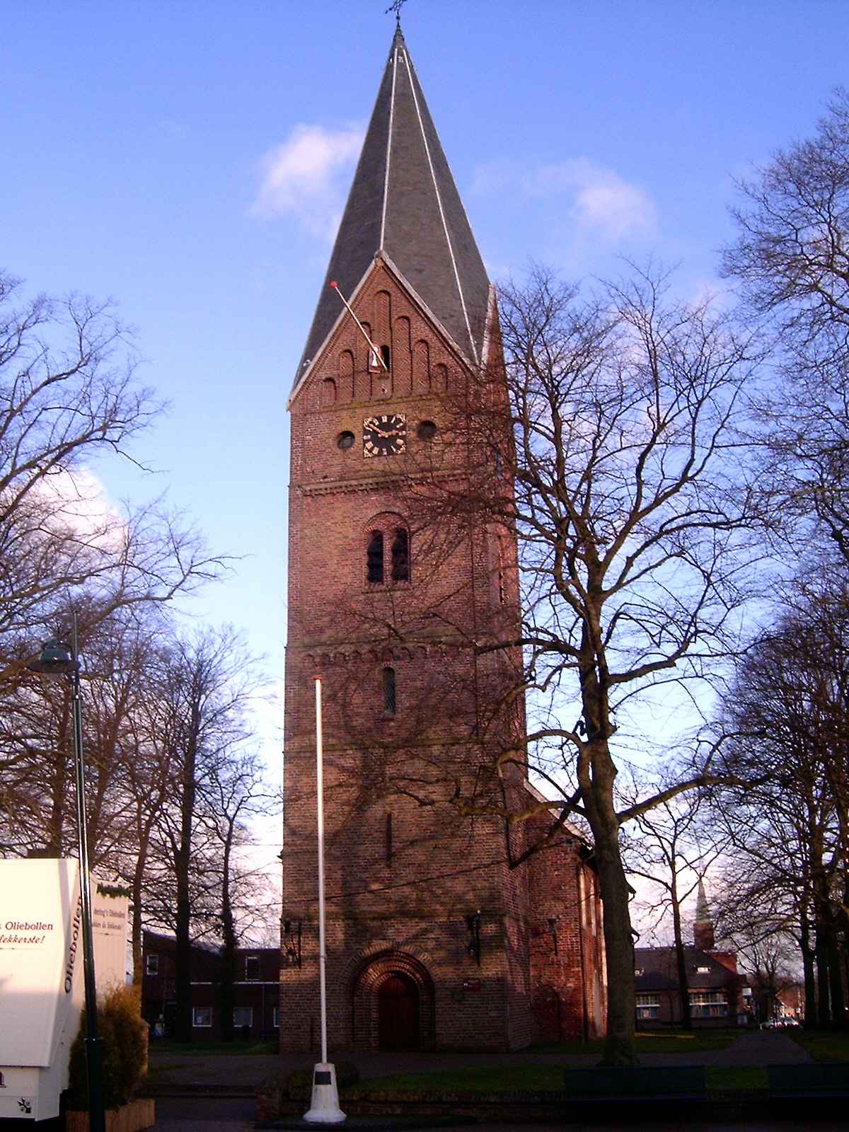 Hervormde Kerk van Haren